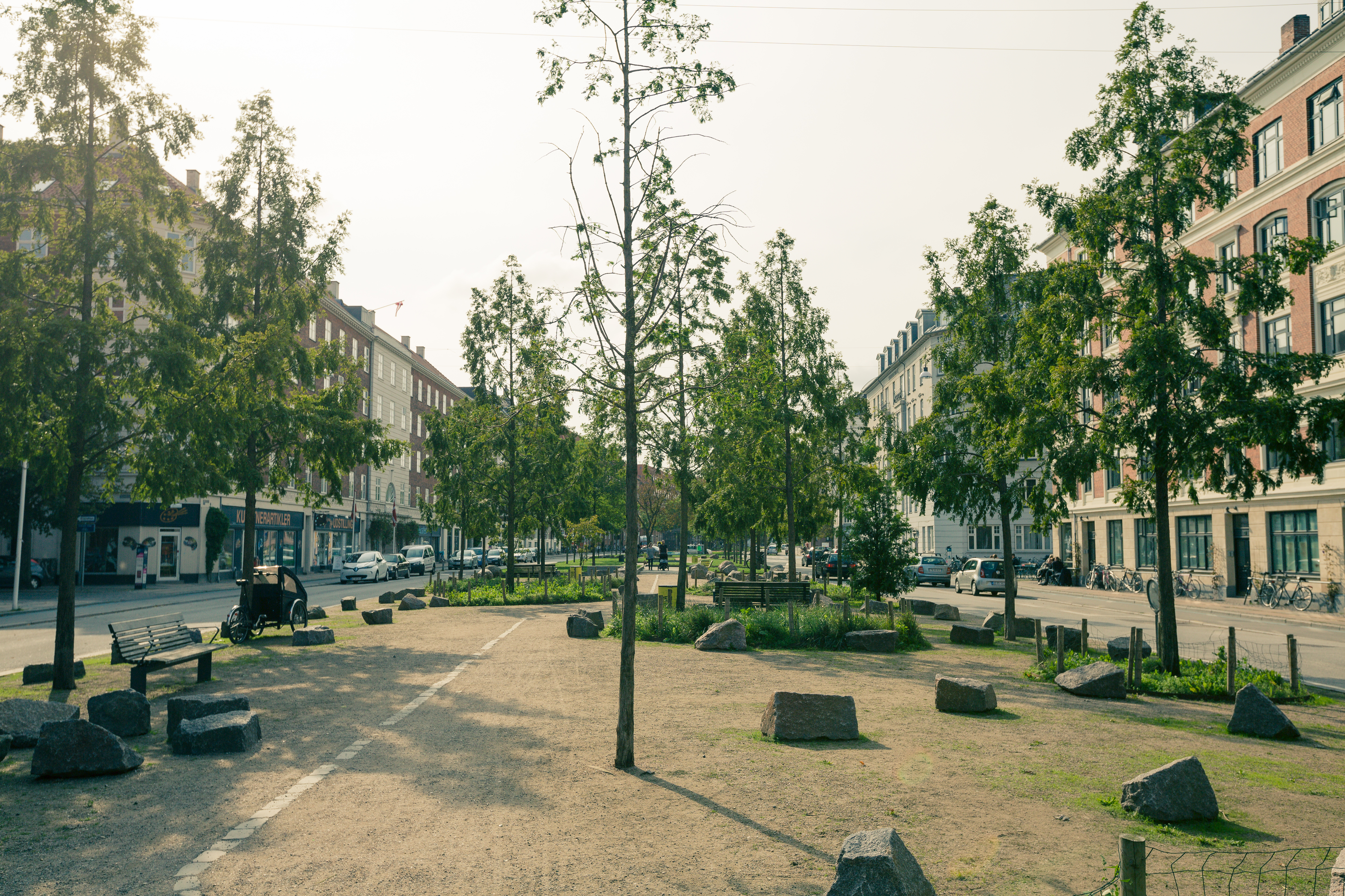 Copenhagen, Denmark Licensing